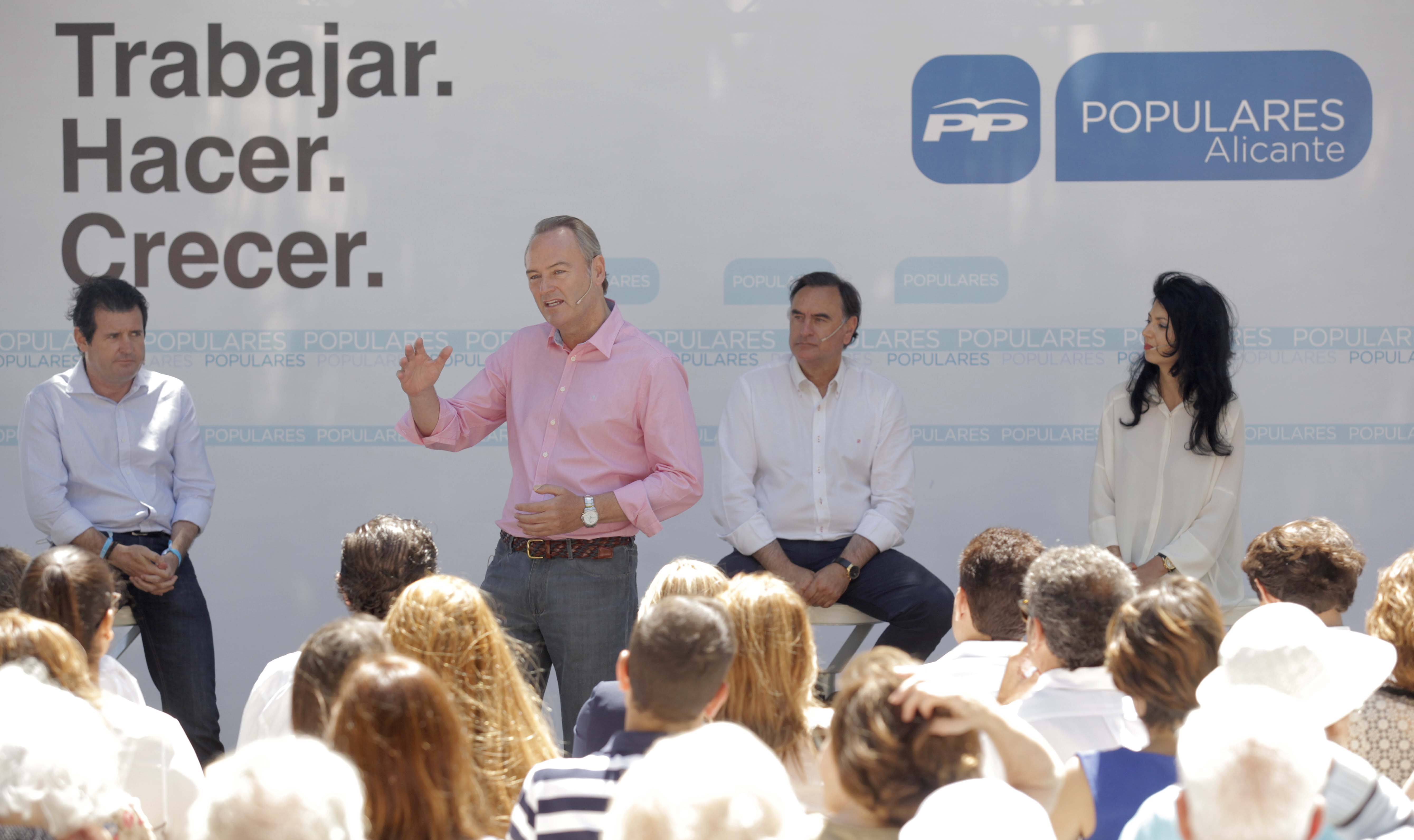 Altea durante el acto de celebración del Día de Europa